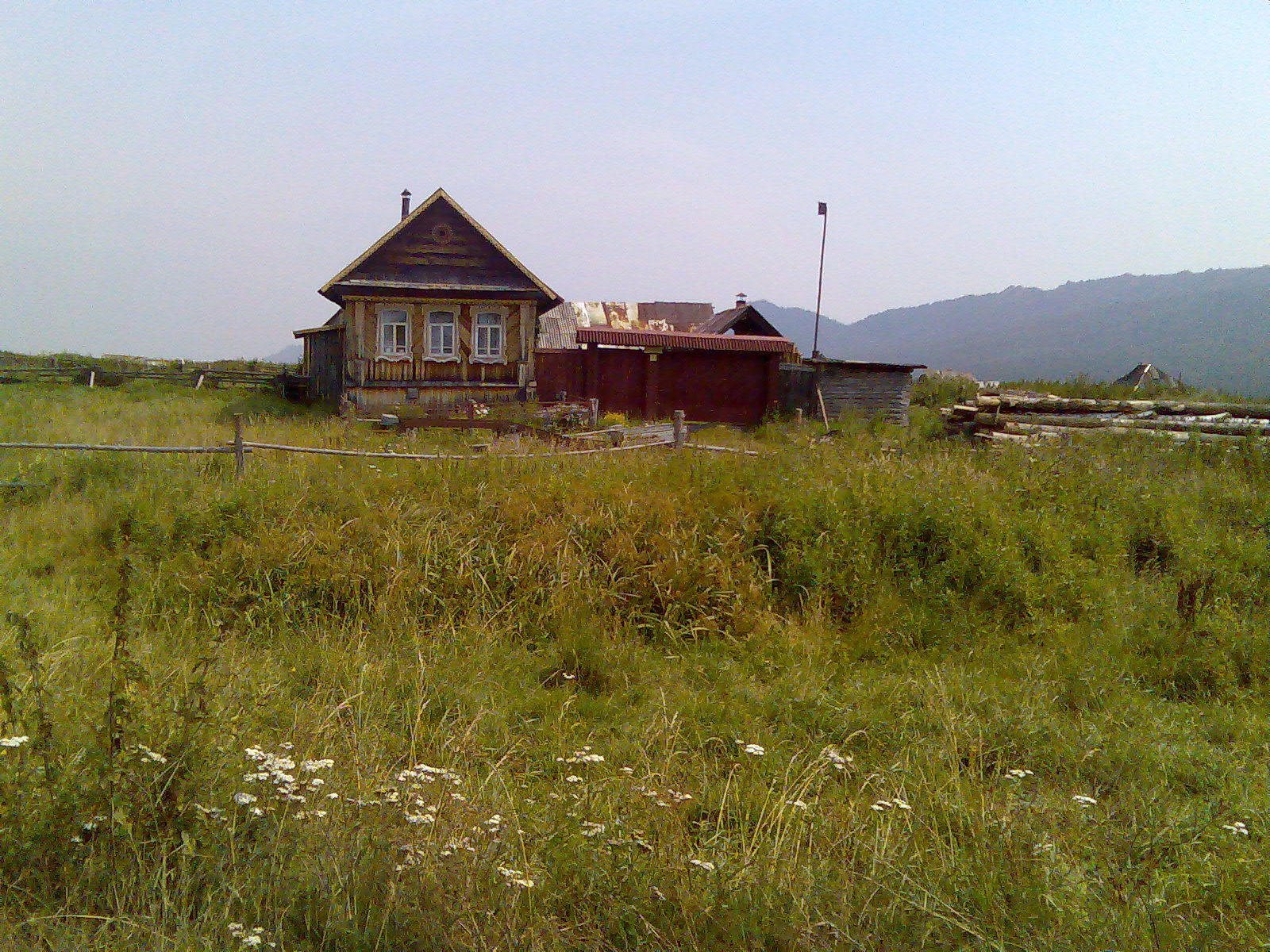 Улица Солнечная, дом №1